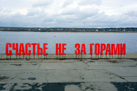 Надпись Счастье не за горами, расположена на берегу реки Кама, возле вокзала Пермь-1 в городе Пермь.